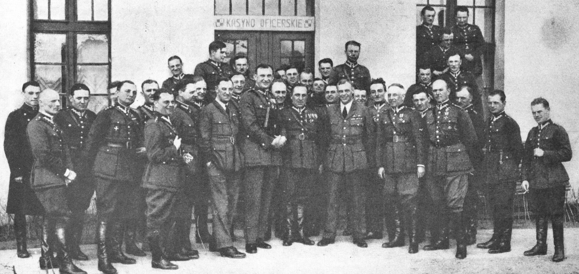 Oficerowie 4 Pułku Lotniczego w 1933 roku.